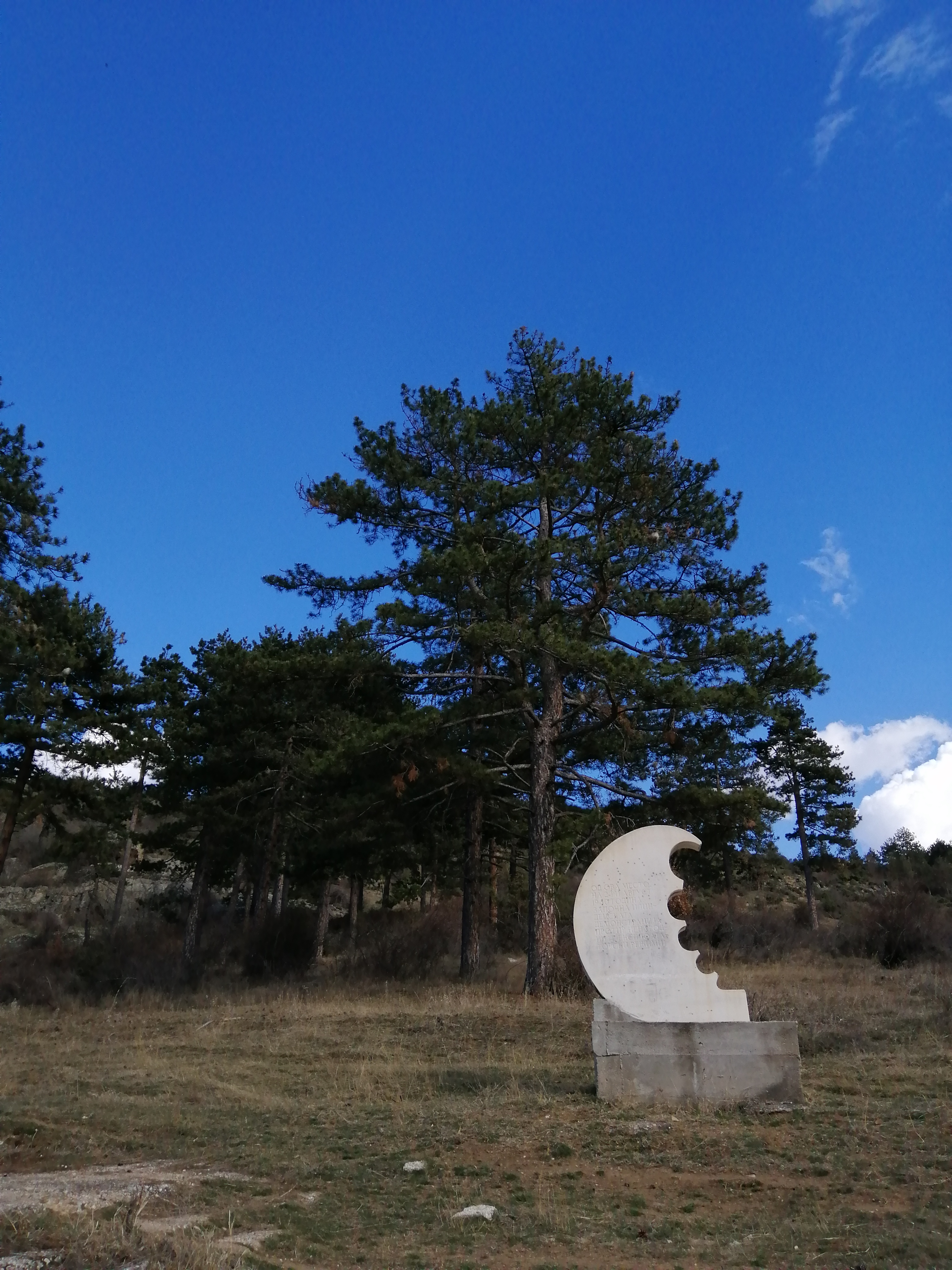 Месноста Шаторов Камен во близина на Прилеп, од каде на 2 август 1940 година започнале Илинденските демонстрации